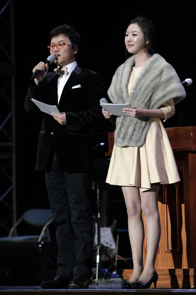 개그맨 김학도와 배우 지유